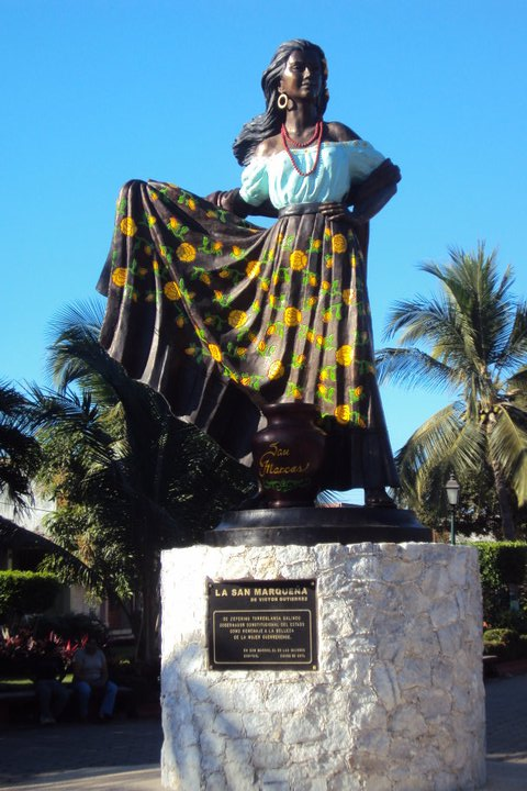 ESTATUA DE LA SANMARQUEÑA BONITA